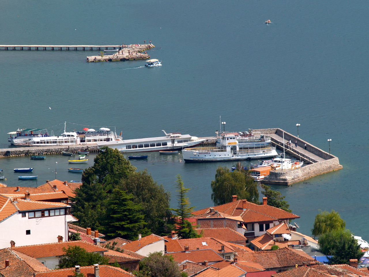 Ohrid, Macedonia